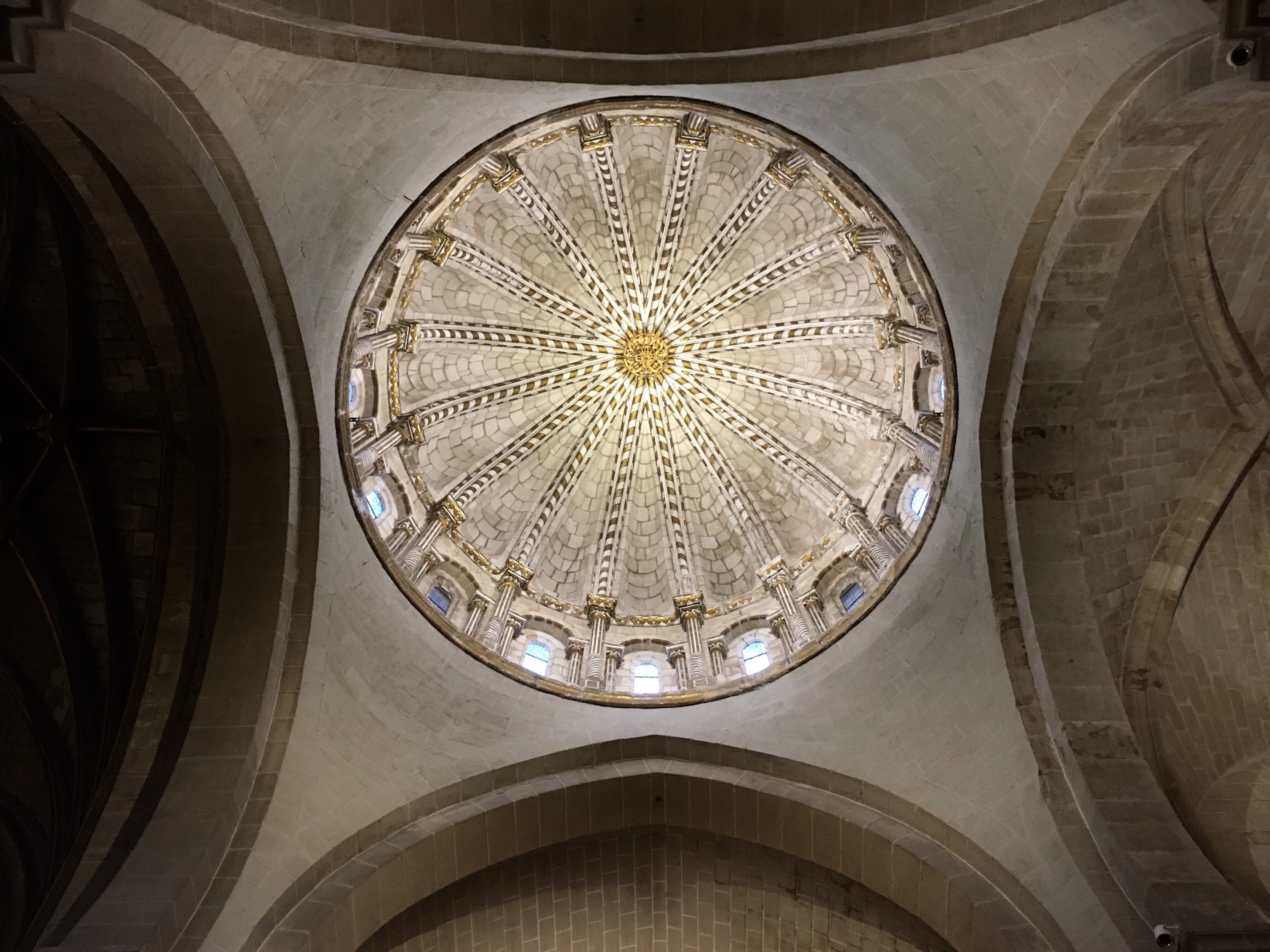 Cúpula del crucero. Catedral de Zamora.